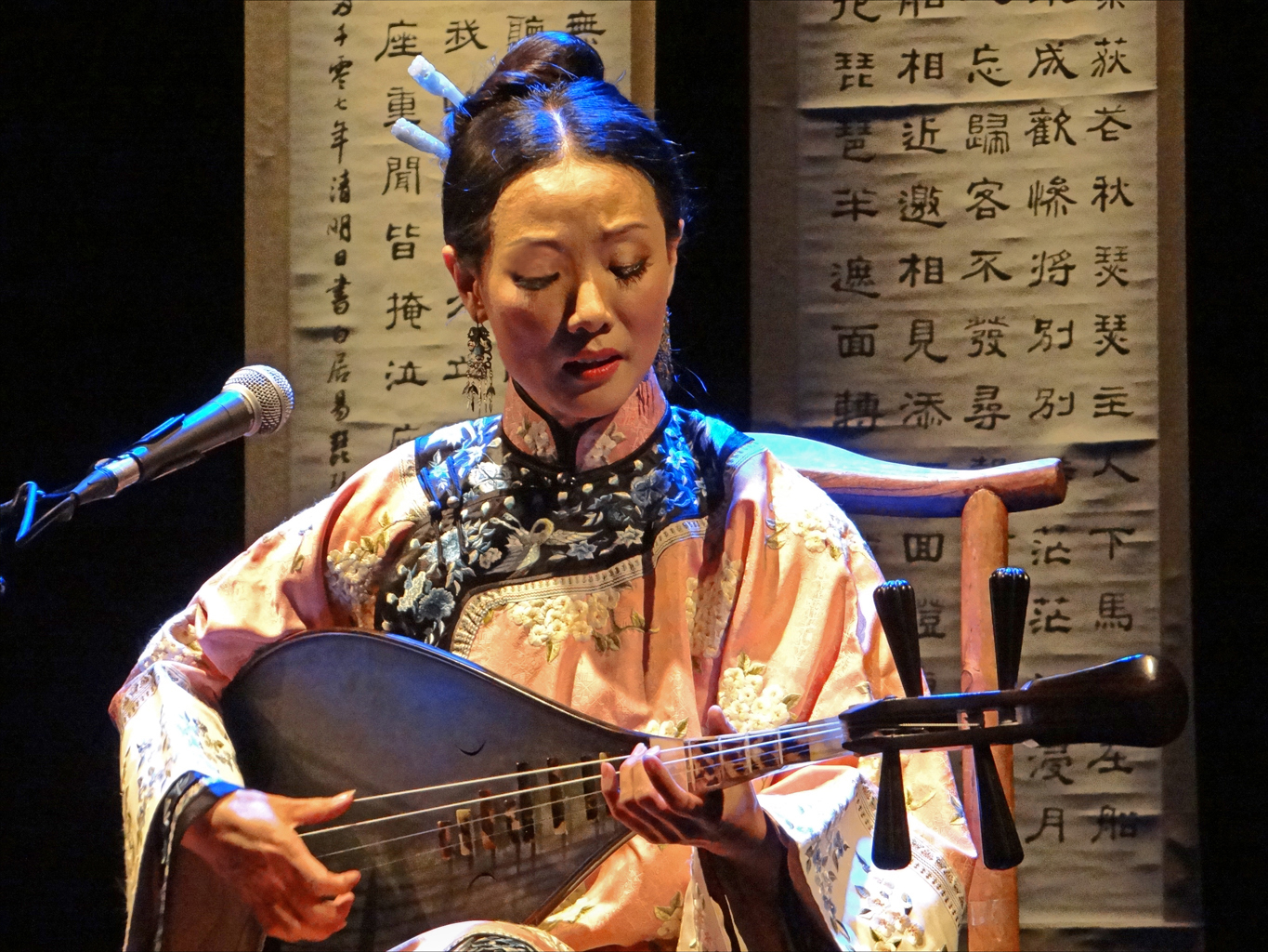 Wang Xinxin, jouant du pipa Concert de musique Nanguan (musique chinoise ancienne), organisé par le Centre Culturel de Taïwan et le musée Guimet. "Le banquet d’automne" par le Xinxin Nanguan Ensemble Direction Wang Xinxin (Taïwan) Avec Wang Xinxin (chant, erhu, pipa), Huang Chin-hsin, guqin (cithare chinoise), Wang Xin-yuan, sanxian (luth chinois à trois cordes). Mardi 25 septembre à 20h30 Auditorium du musée Guimet Article de Wikipedia sur la musique nanguan